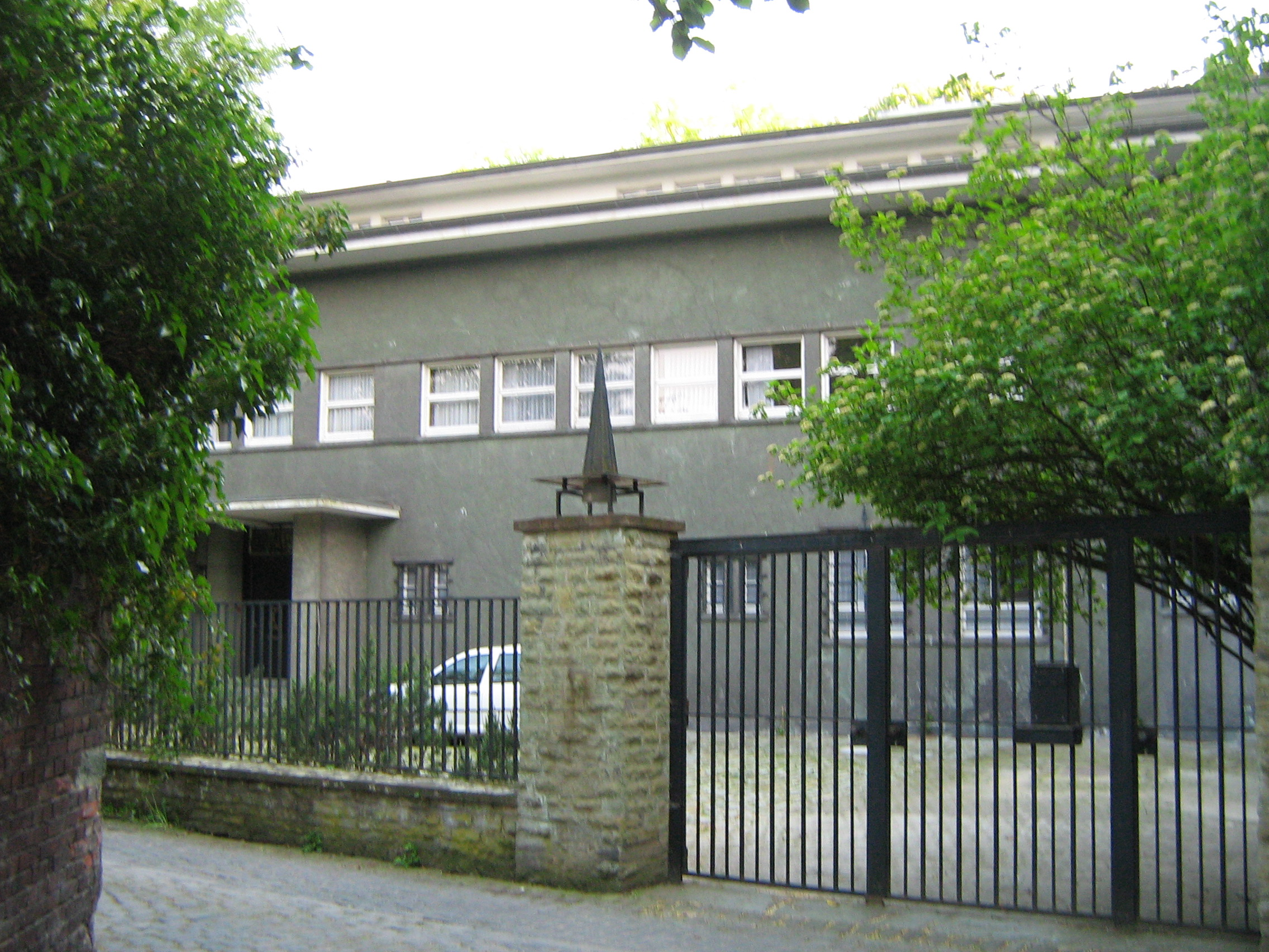 Villa Sternberg in Soest von Straße aus – der innen wie außen besterhaltene Bau Bruno Pauls (1927) in der Stadt This is a photograph of an architectural monument.